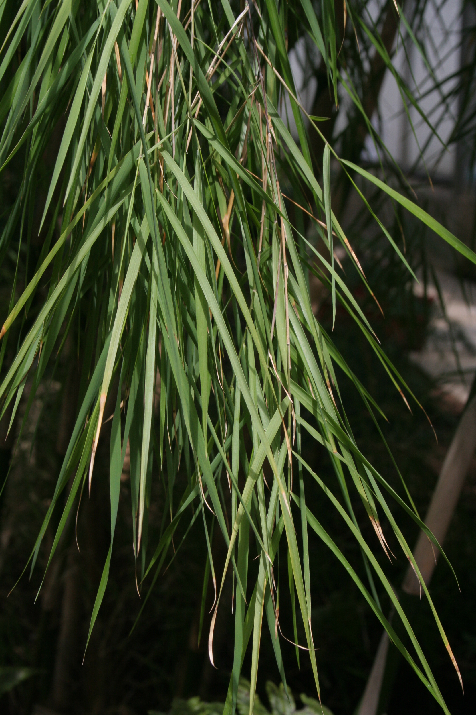 Otatea acuminata aztecorum, conservatoire botanique national de Brest, France, Juin 2007